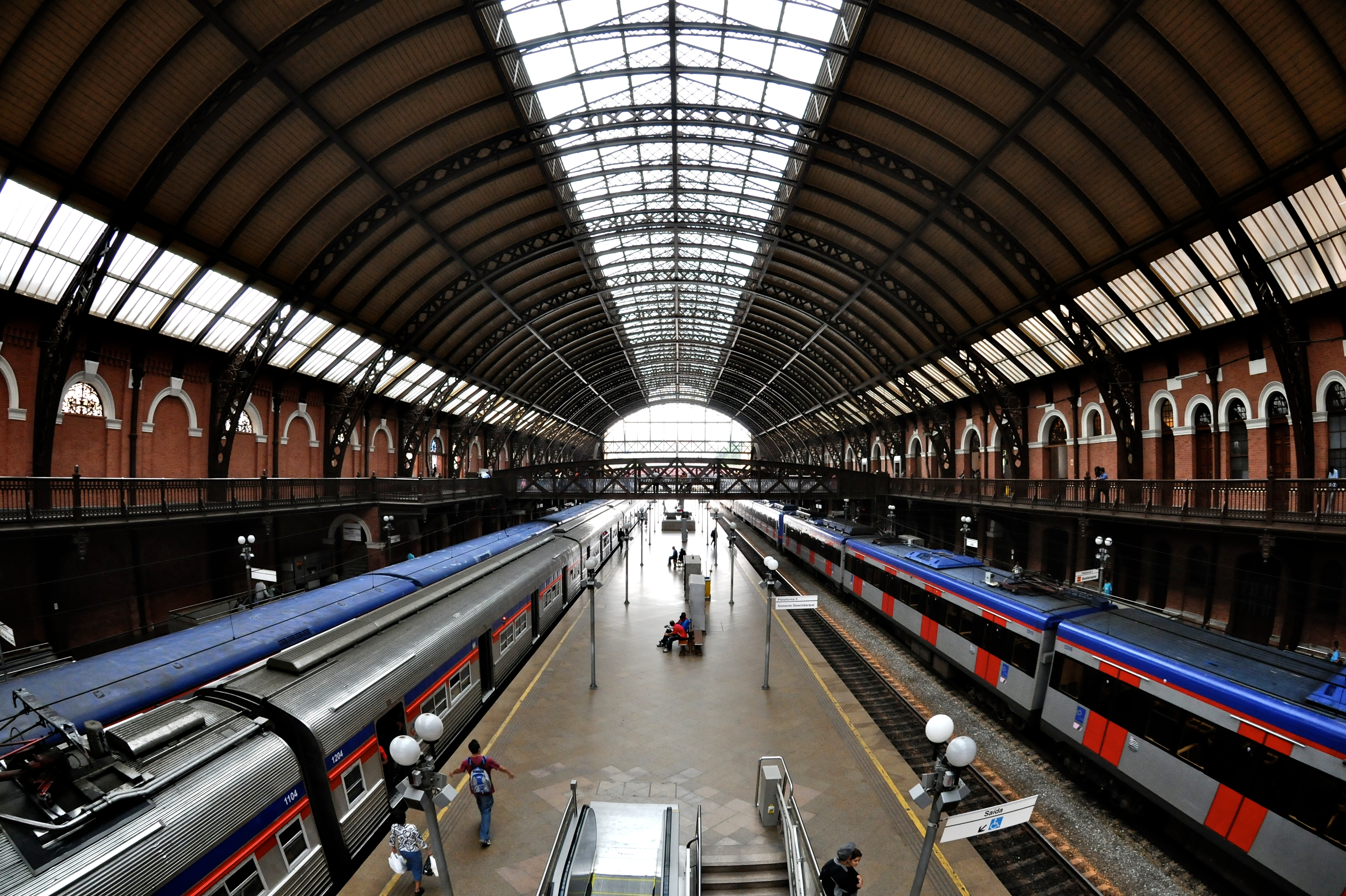 Luz Station